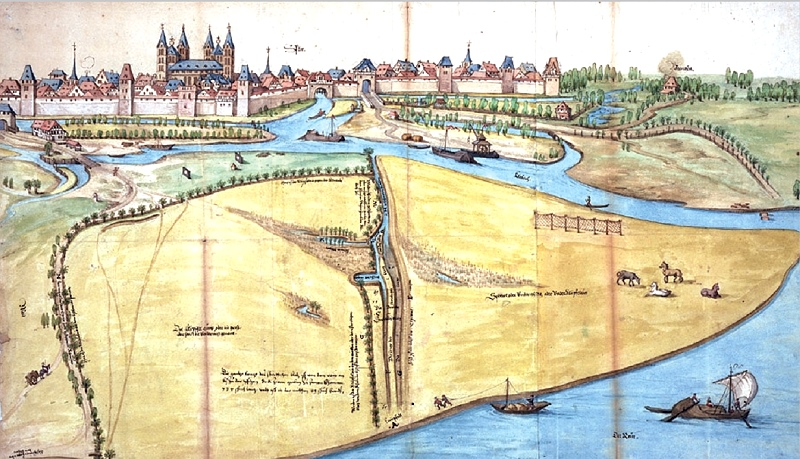 Ansicht von Speyer mit der Klüpfelsau im Vordergrund. Aquarell von Wilhelm Besserer aus dem Jahr 1574. Das Bild, eine sogenannte Augenscheinkarte, diente als Unterlage in einem Rechtsstreit der Stadt Speyer gegen den Bischof von Speyer vor dem Reichskammergericht.